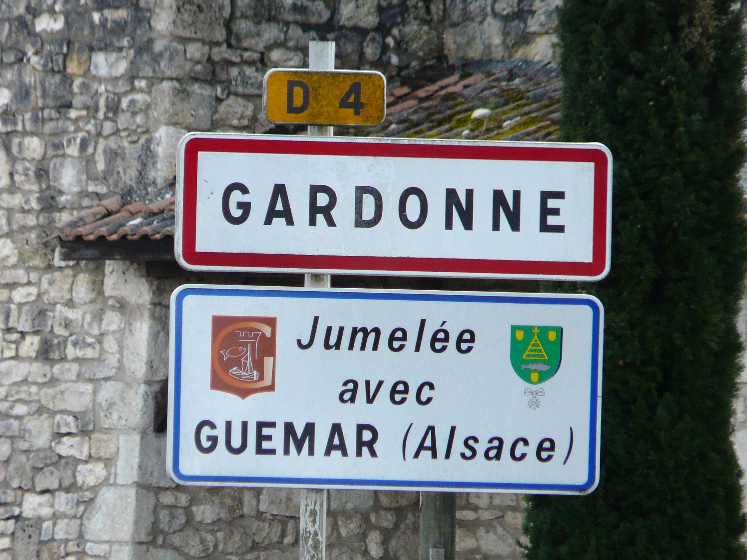 Jumelage sur panneau de signalisation, Gardonne, Dordogne, France.